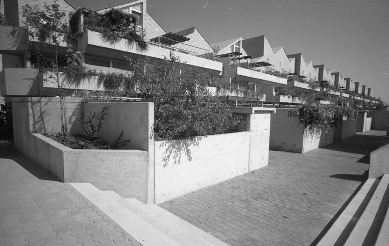 Stuttgart, Demonstrativbauvorhaben Neugereut